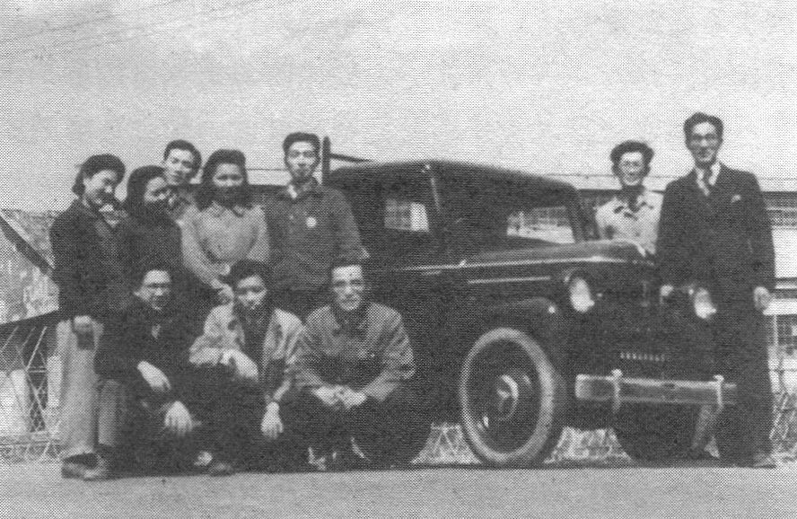 東京電気自動車（株）の電気トラックEOT-47型、同社の府中工場にて、設計陣全員と。